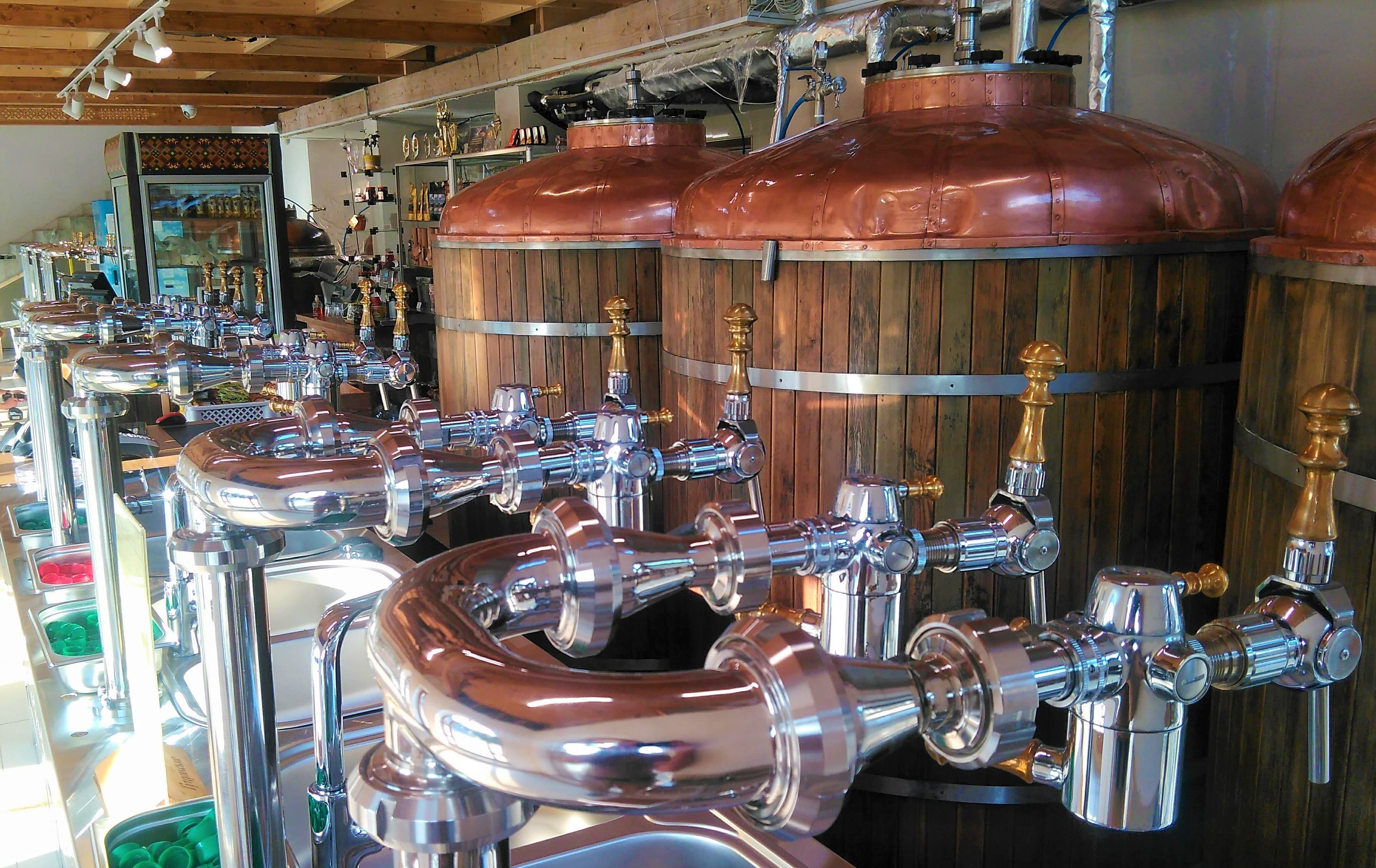 Крамниця броварні в 2019 році обновила торгове обладнання